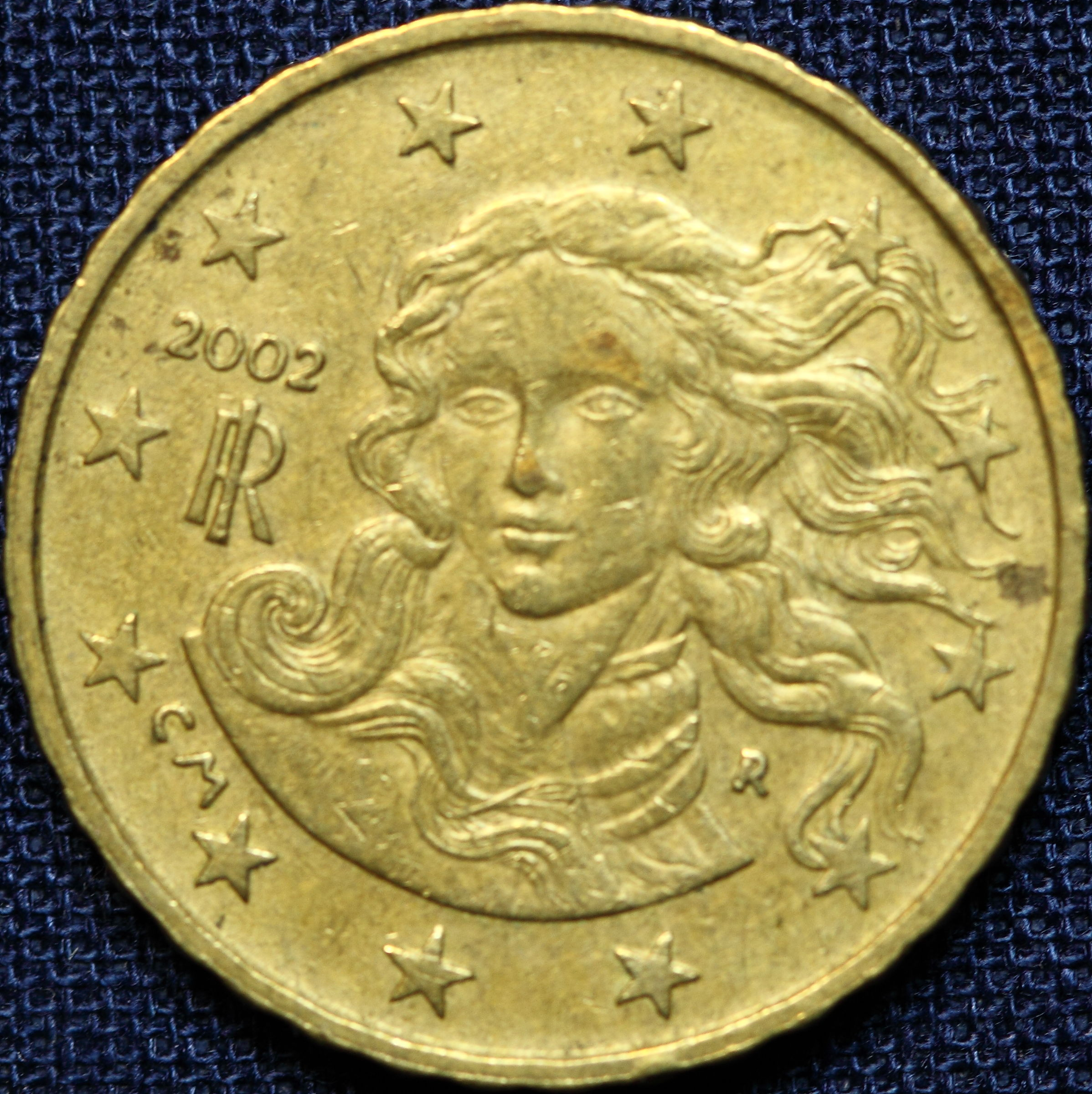 2002 Euro ten cent (France mint)